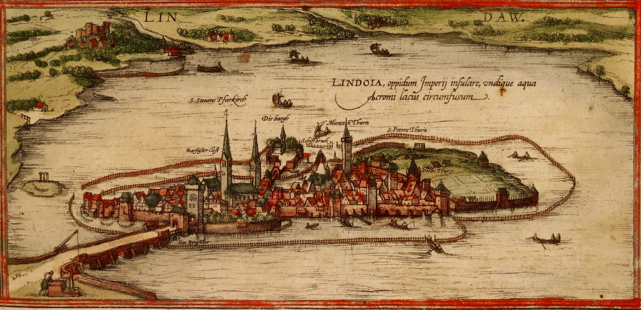 Lindau im Bodensee. Woodcut attributed to Sebastian Munster, 1550; from: Braun & Hogenberg, Civitates Orbis Terrarum I, 31 (1572)